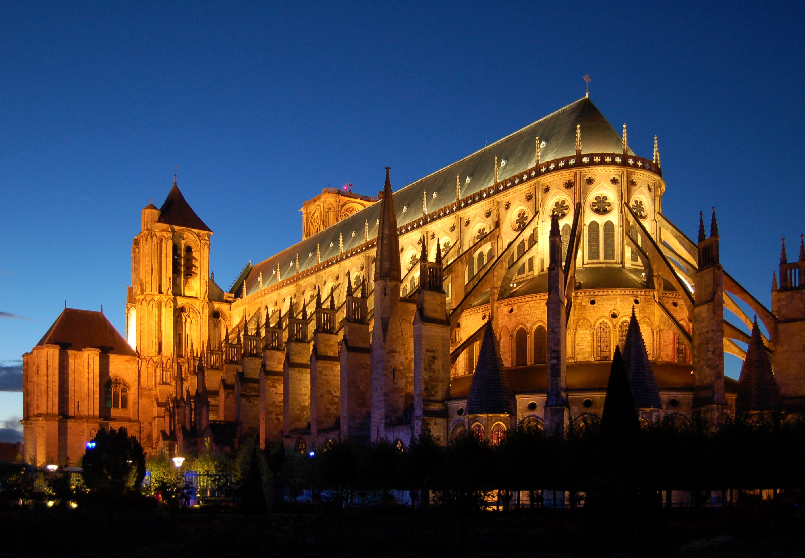 Kathedrale Saint-Etienne von Bourges bei Nacht